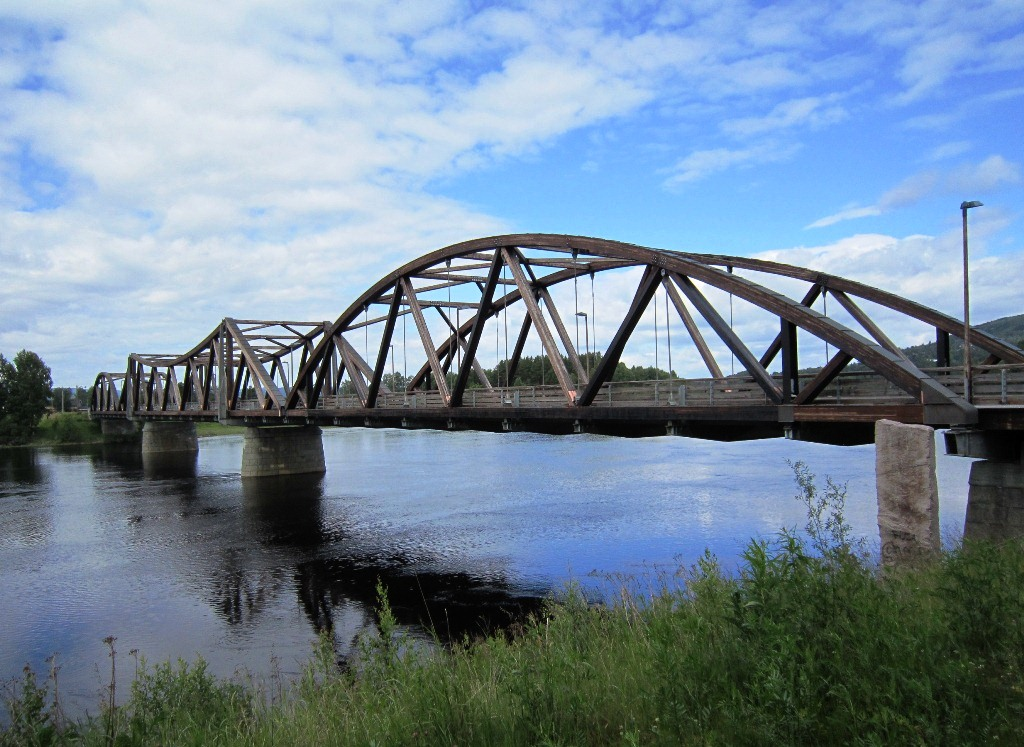 Flisa bru